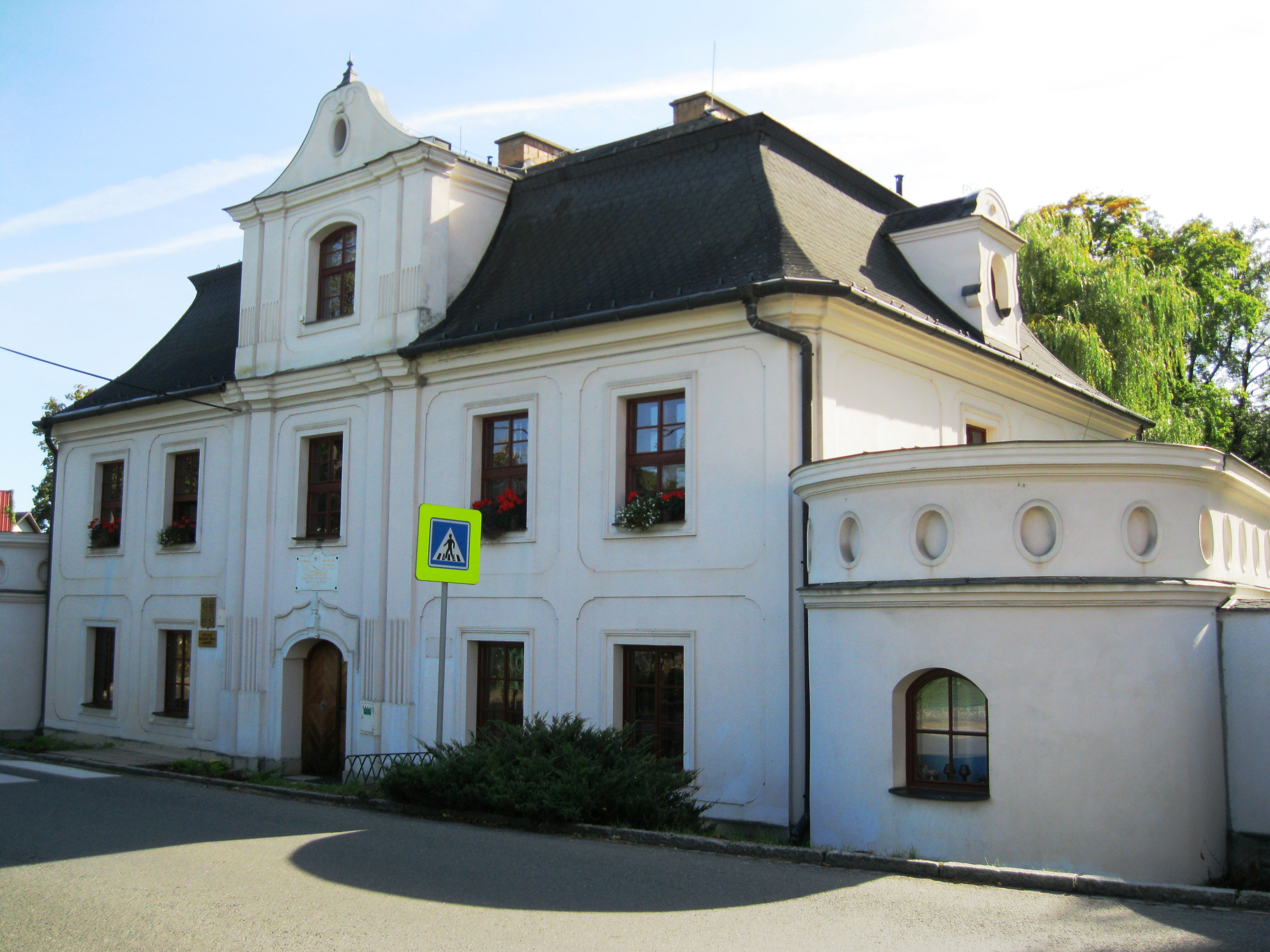 Měšťanský dům Karla Ditterse z Dittersdorfu (Město Javorník), Puškinova 57, Město Javorník